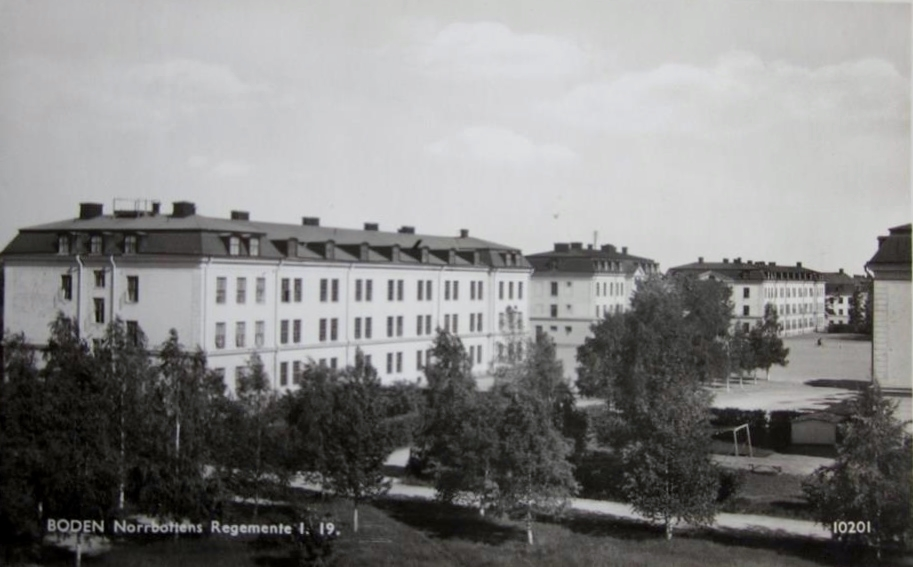 Norrbottens regementes kaserner, Norrbottensvägen i Boden. I förgrunden ses Norra kasernen, kanslihuset och Östra kasernen. Västra kasernen skymtas av hörnet av byggnaden.